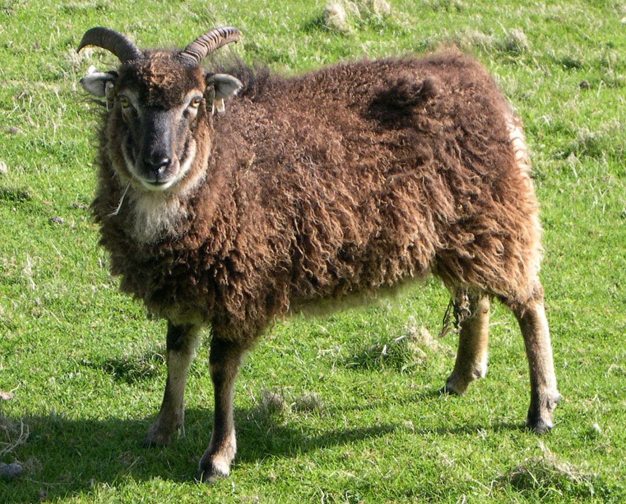 Soay ewe